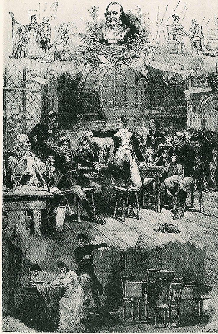 Bühnenbilder aus ´´Hoffmanns Erzählungen´´ von Jacques Offenbach. Nach der Pariser Uraufführung